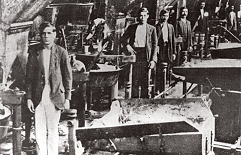 Em um bairro operário na cidade de São Paulo durante a greve de 1917 trabalhadores cruzam os braços reinvindicando direitos hoje considerados trabalhistas entre outros o da carga de trabalho diária de 8 horas e férias.